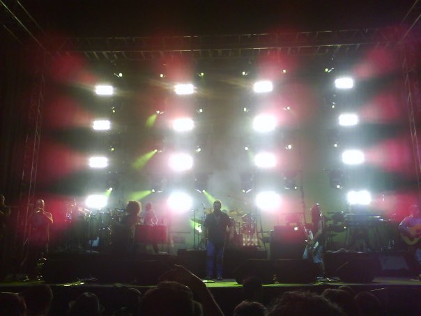 Los Fabulosos Cadillacs en Medillín, Colombia